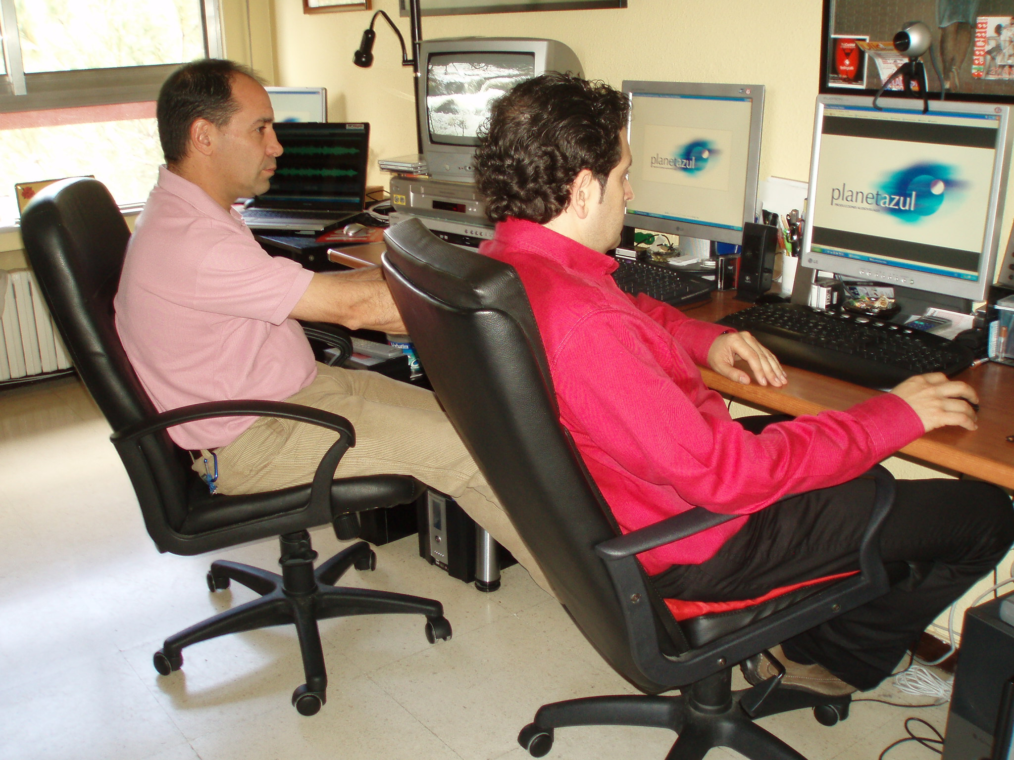 Sala de postproducción de Planetazul